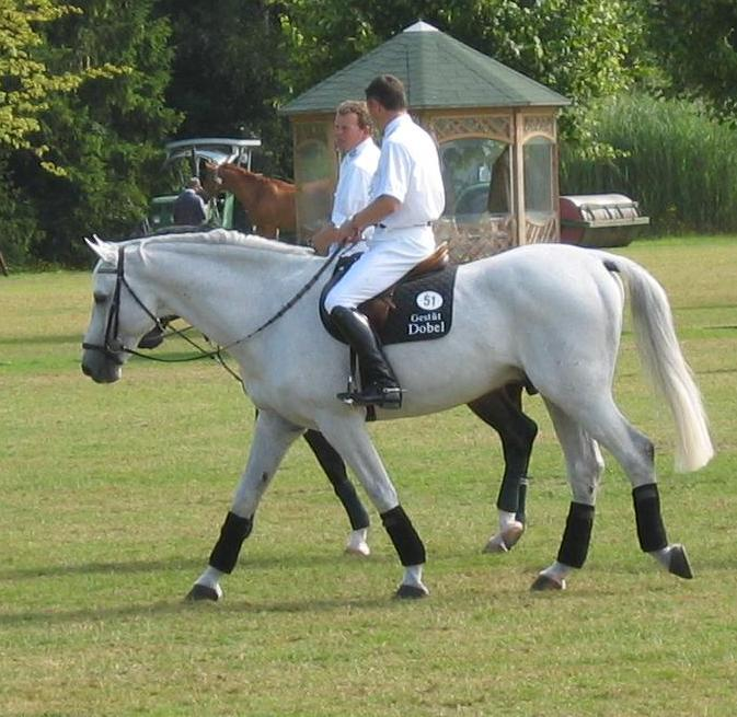 Otto Becker auf Dobel's Cento (Holsteiner) Copyright Status: GNU Freie Dokumentationslizenz